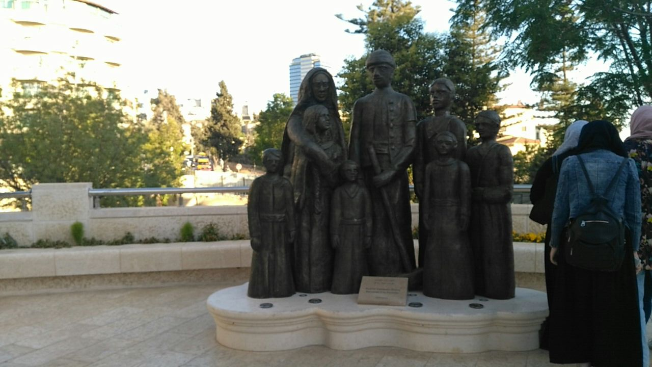 نُصب راشد الحدادين مؤسس مدينة رام الله، حيثُ يقع هذا النصب أمام مبنى بلدية رام الله الجديد